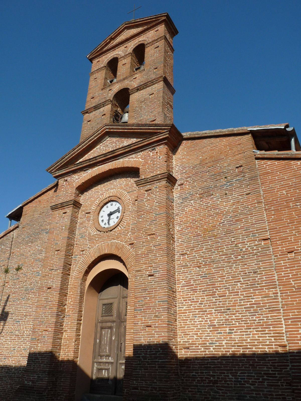 Eglise d'Issus, Haute-Garonne, France